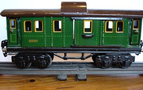 Märklin postwagon 1889/0